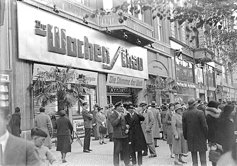 Das erste deutsche Wochenschau-Kino in Berlin eröffnet! Das erste deutsche Wochenschau-Kino in Berlin, wo nur die aktuellsten Ereignisse aus der ganzen Welt gezeigt werden.